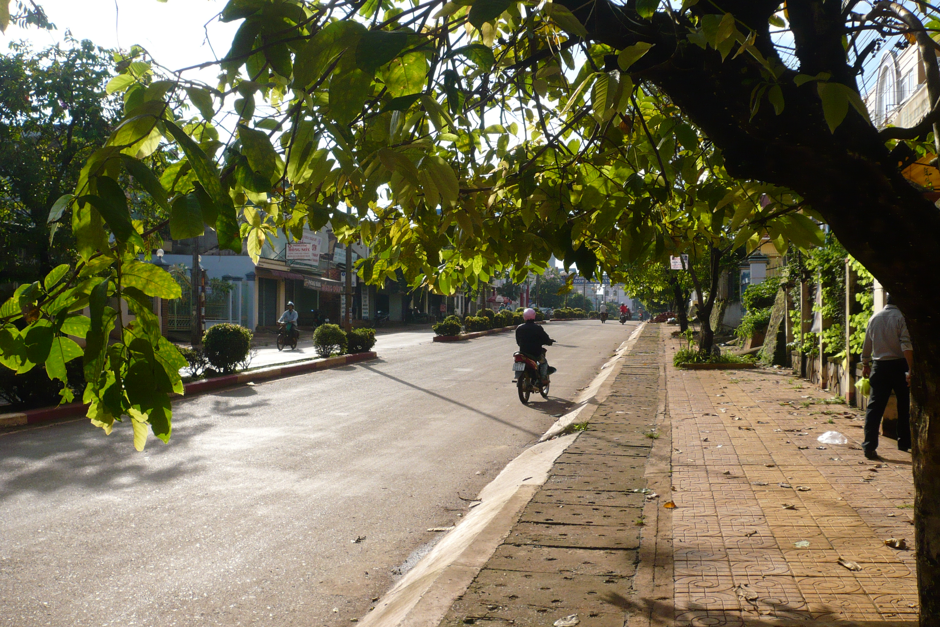 Lộc Ninh, Binh Phuoc, Việt Nam